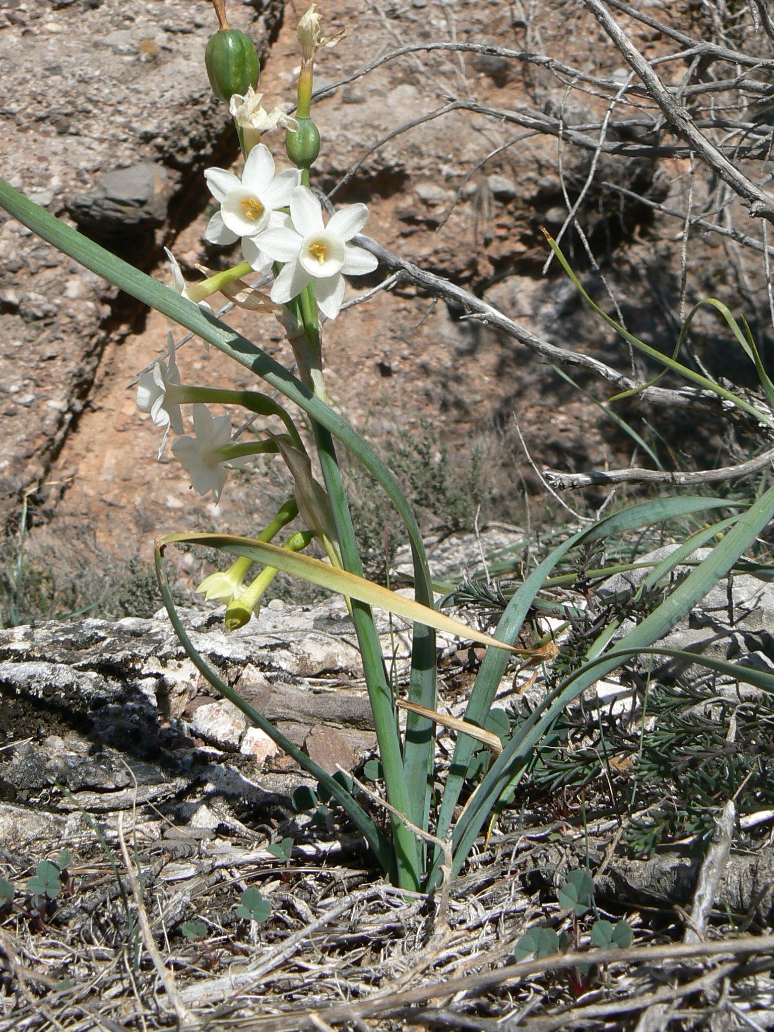 Description: Narcissus dubius Gouan